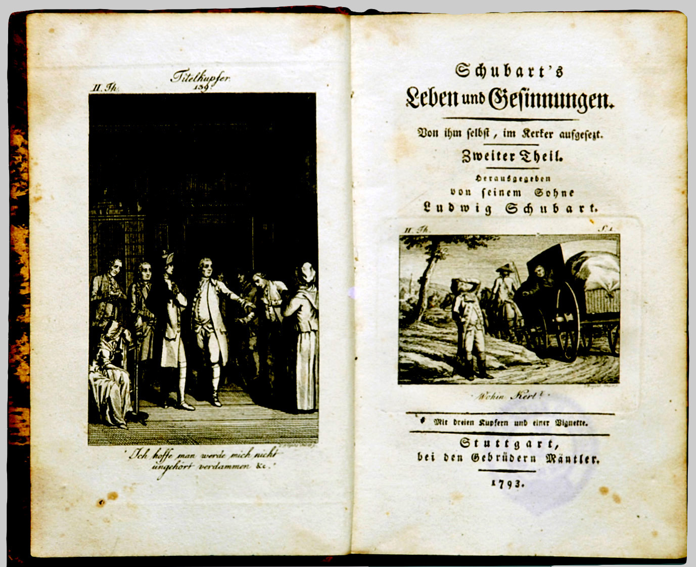 Christian Friedrich Daniel Schubarts "Leben und Gesinnungen" 2. Theil 1793